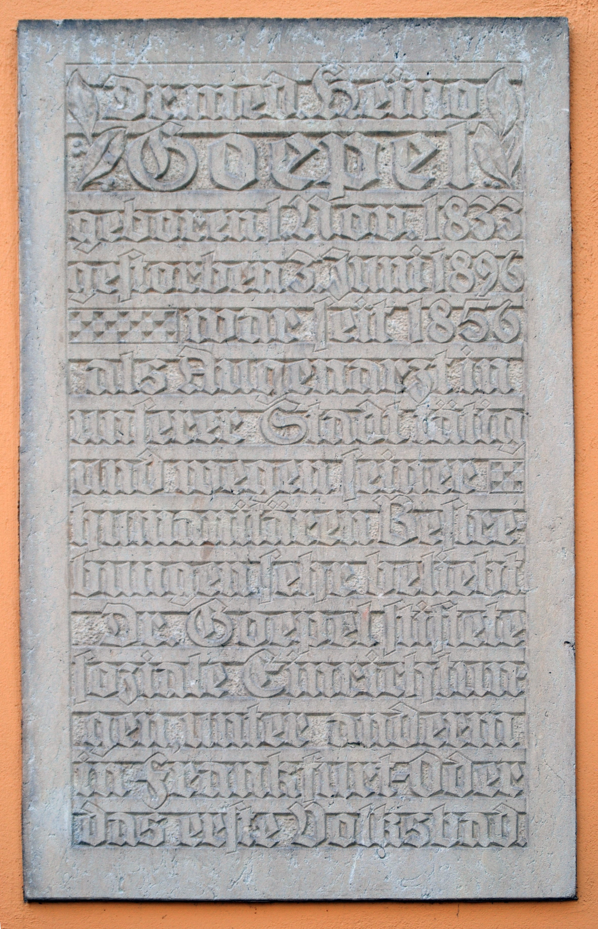 Gedenktafel für Heino Goepel am Marienbad 2 in Frankfurt (oder)